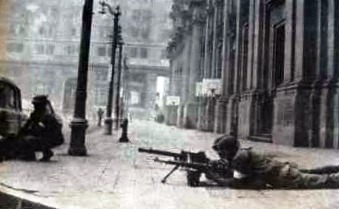 El Tanquetazo o Tancazo fue un fallido golpe de estado en contra del gobierno socialista de la Unidad Popular del presidente Salvador Allende, en Chile. Ocurrió el 29 de junio de 1973, y fue liderado por el Teniente Coronel Roberto Souper, del Regimiento Blindado Nº2. Se le denominó "Tanquetazo" porque los rebeldes usaron primordialmente tanques y carros de combate pesados. La sublevación fue sofocada con éxito por los soldados leales al Comandante en Jefe del Ejército, Carlos Prats.